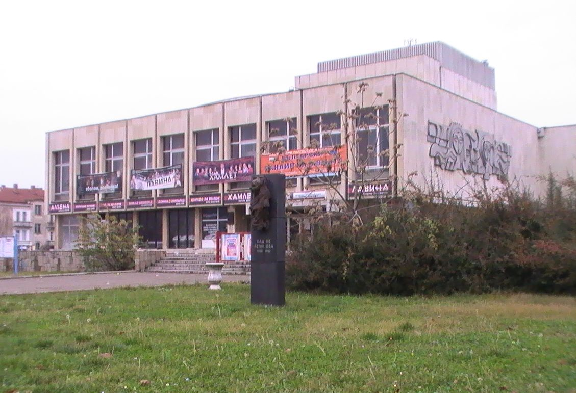 Здание драматического театра в Кырджали (Болгария)